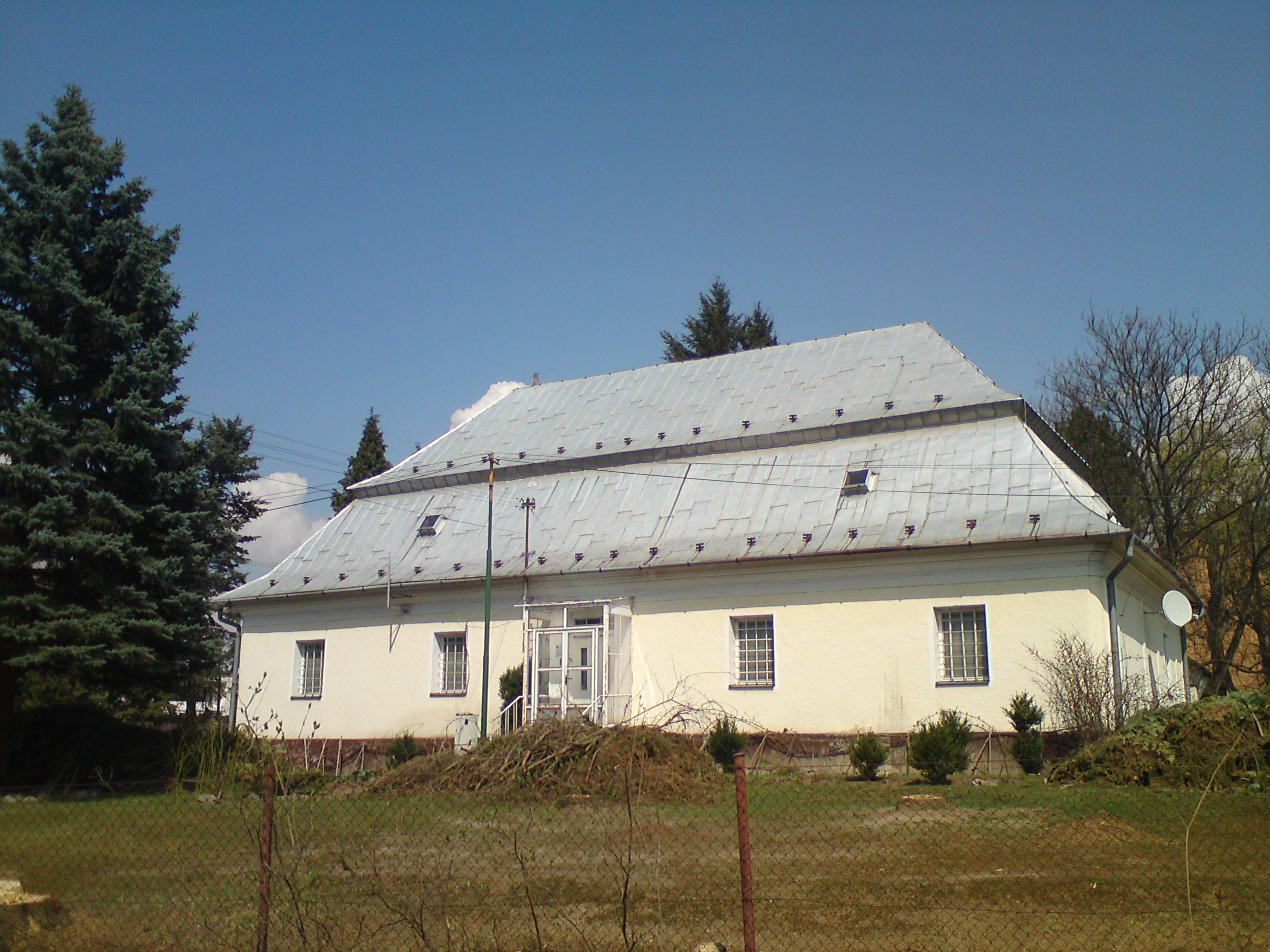 Kúria v obci Višňové, v súčasnosti fara.